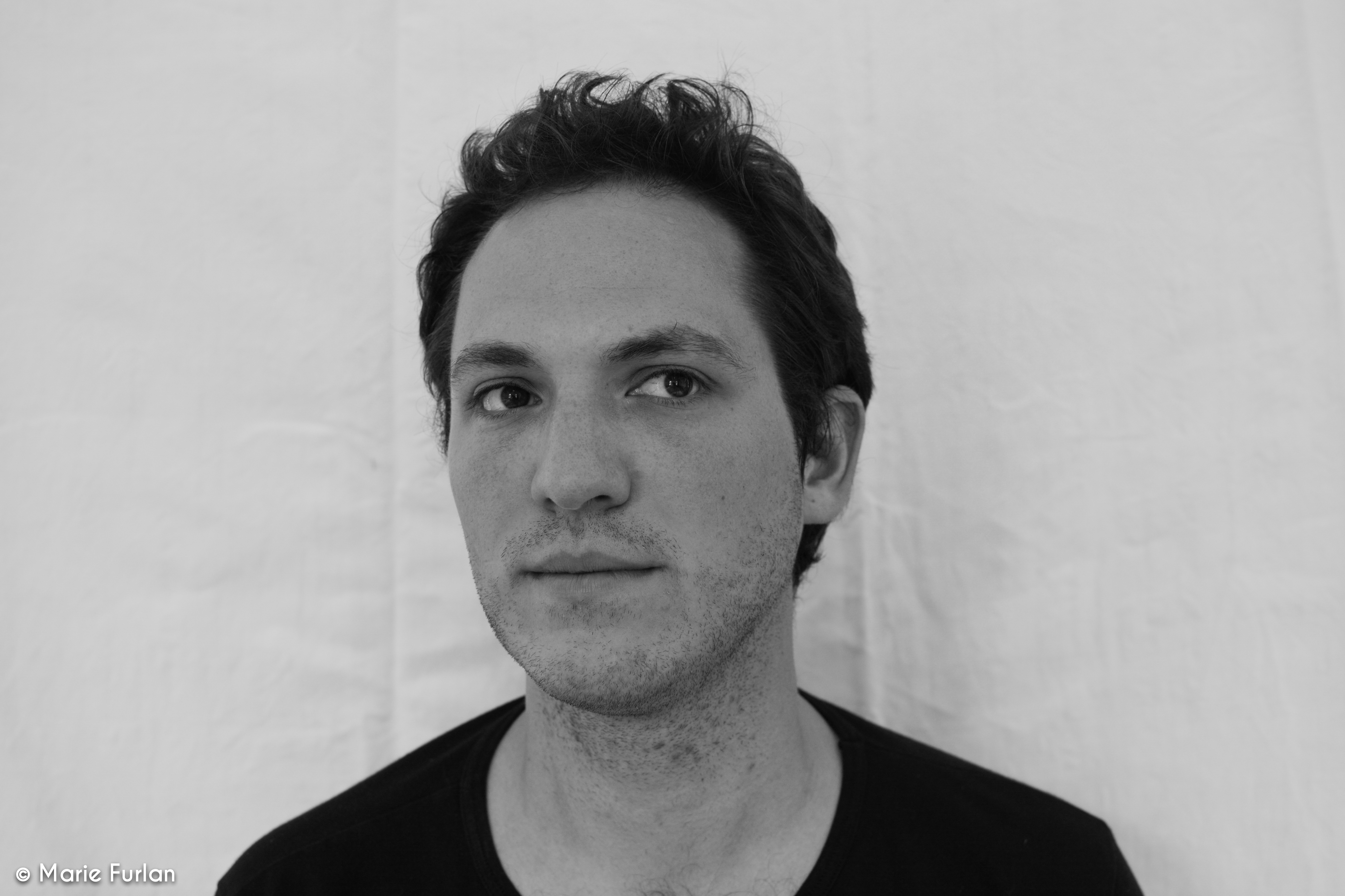 Paul - Noir & blanc avec signature-19